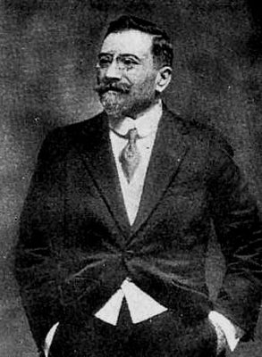 Fotografía de Juan Vázquez de Mella y Fanjul